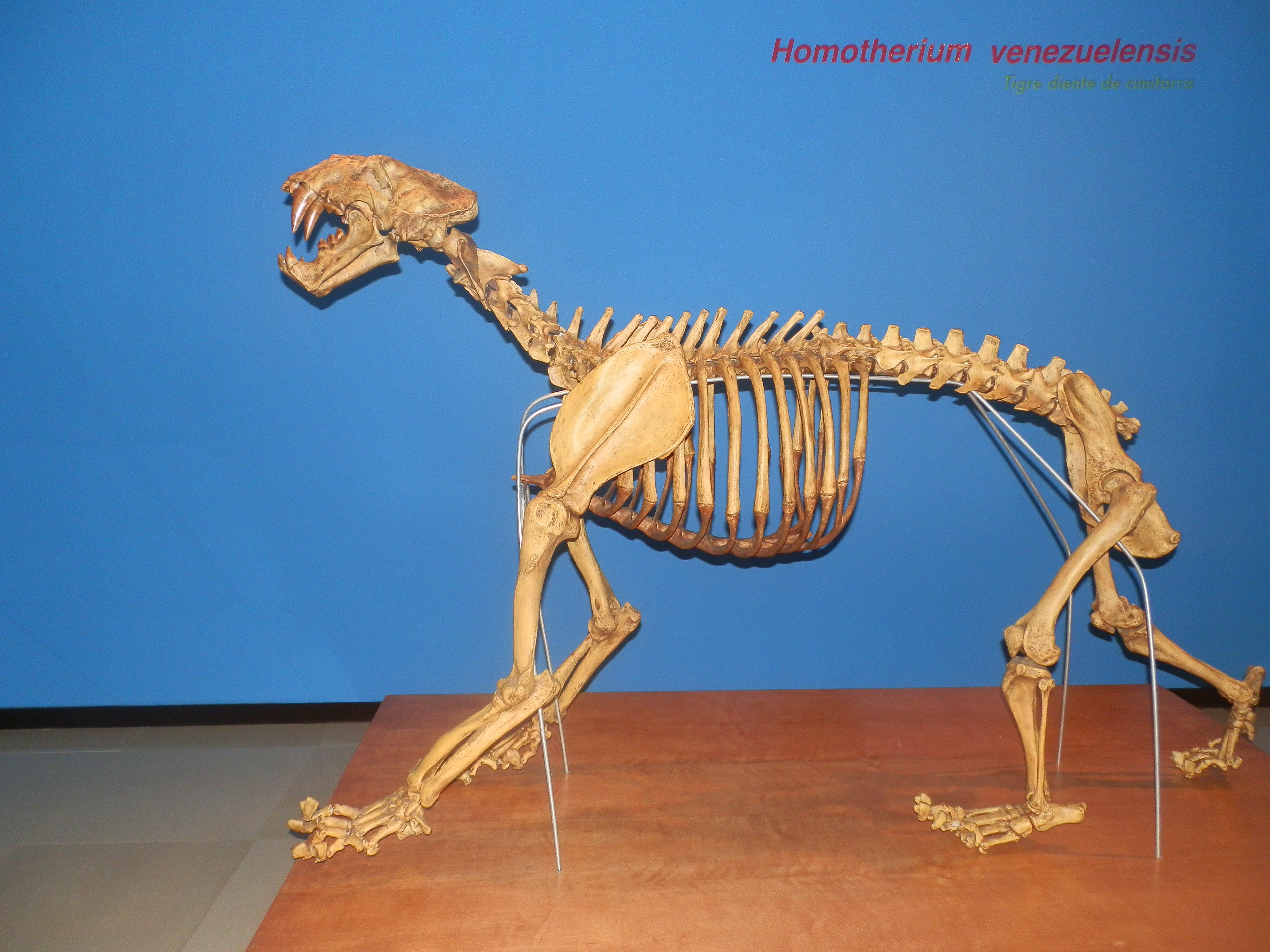 Réplica de esqueleto de Homotherium venezuelensis en PDVSA La Estancia, Maracaibo.